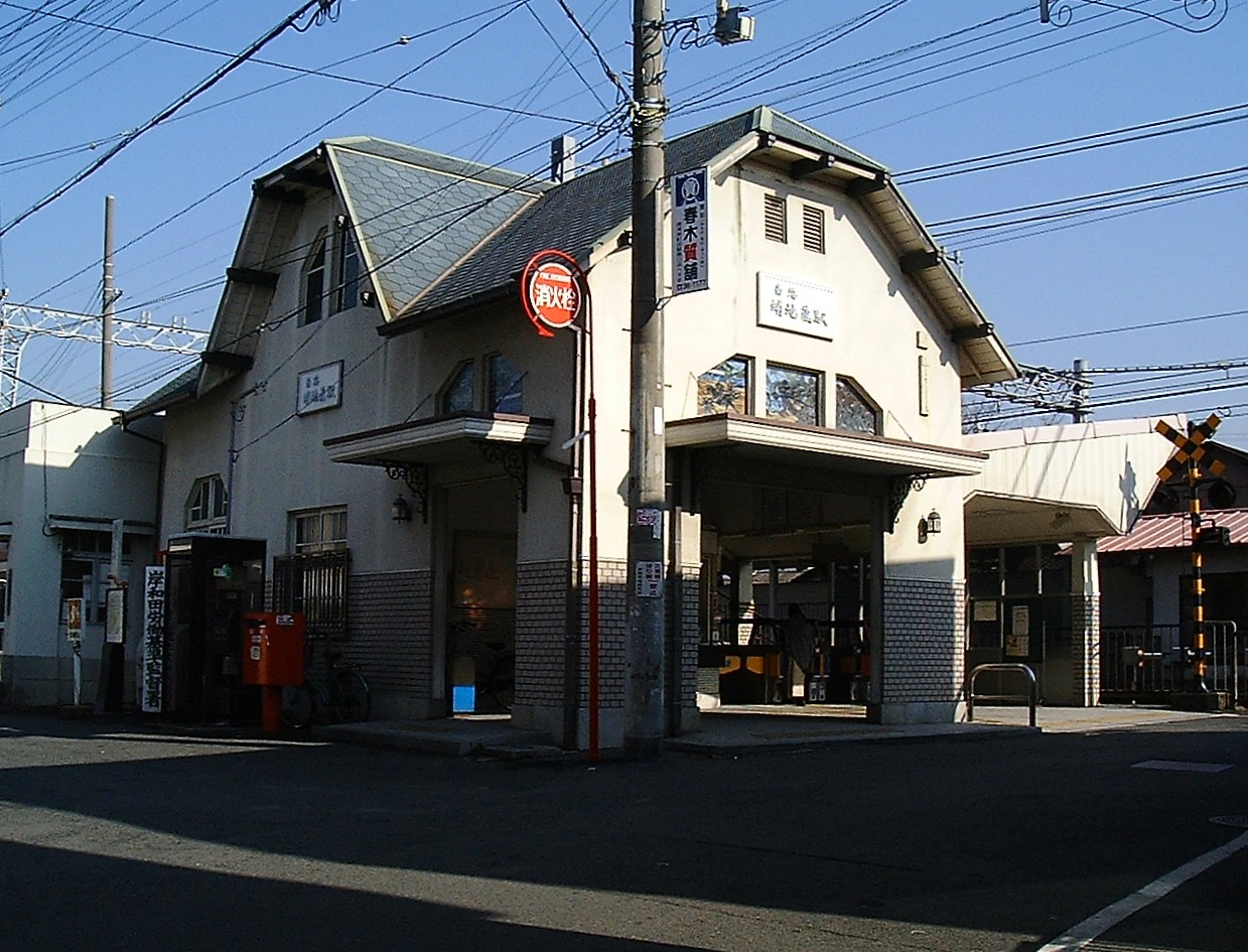 蛸地蔵駅舎（上り駅舎）